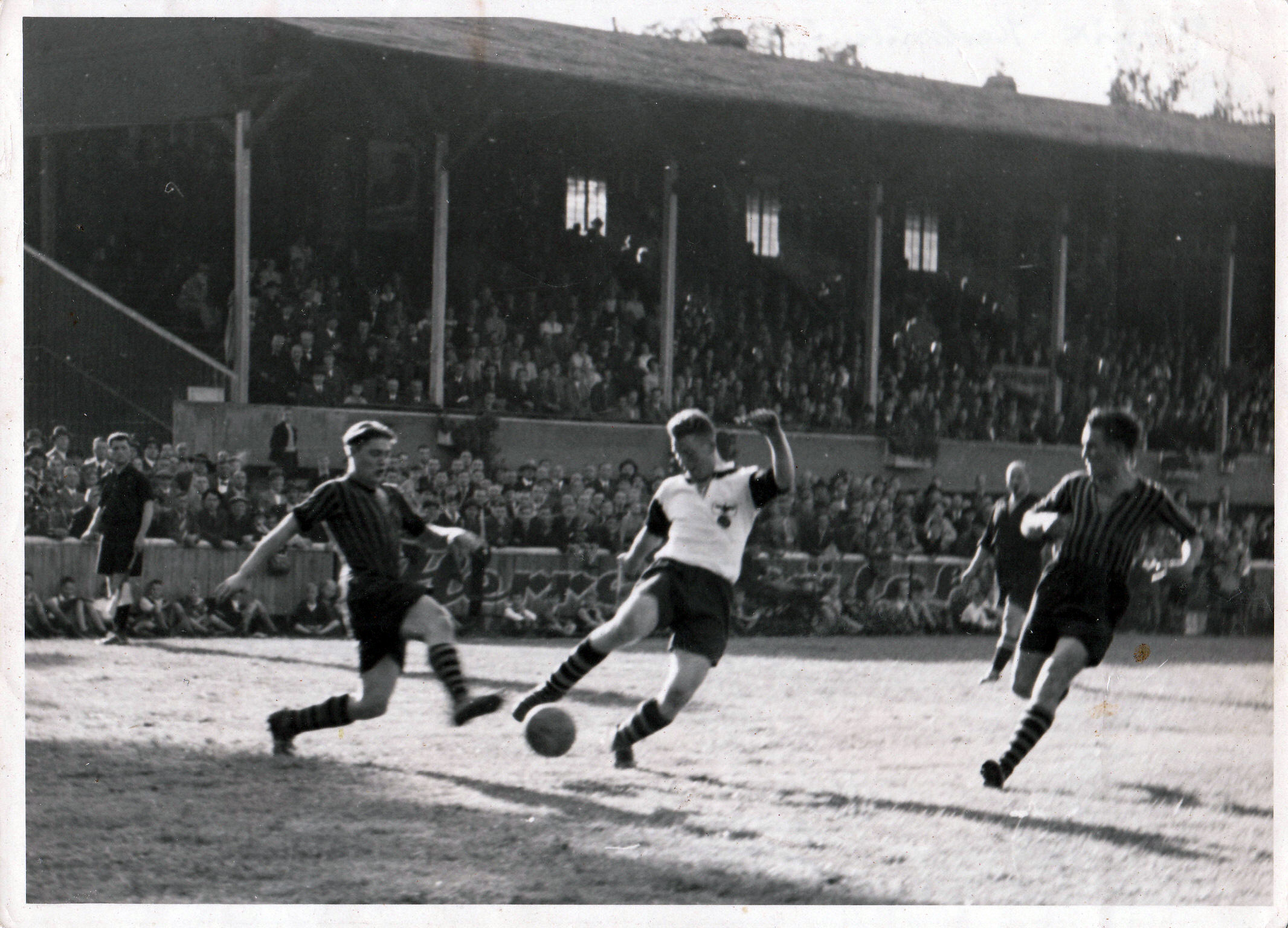 Johann Herberger als Mittelstürmer des FC Phönix Karlsruhe im Kampf mit Verteidigern des SV Waldhof Mannheim in einem Spiel der Gauliga Baden in der Saison 1938/39. Waldhof gewann das Spiel mit 3:2.